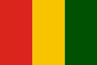 Bandera del Seraiki Qaumi Movement y de facto bandera nacional de los Seraiki Imagen realizada por J. Ollé Véase también: Wikipedia:Autorizaciones/Banderas de Jaume Ollé Categoría:Banderas (imagen)